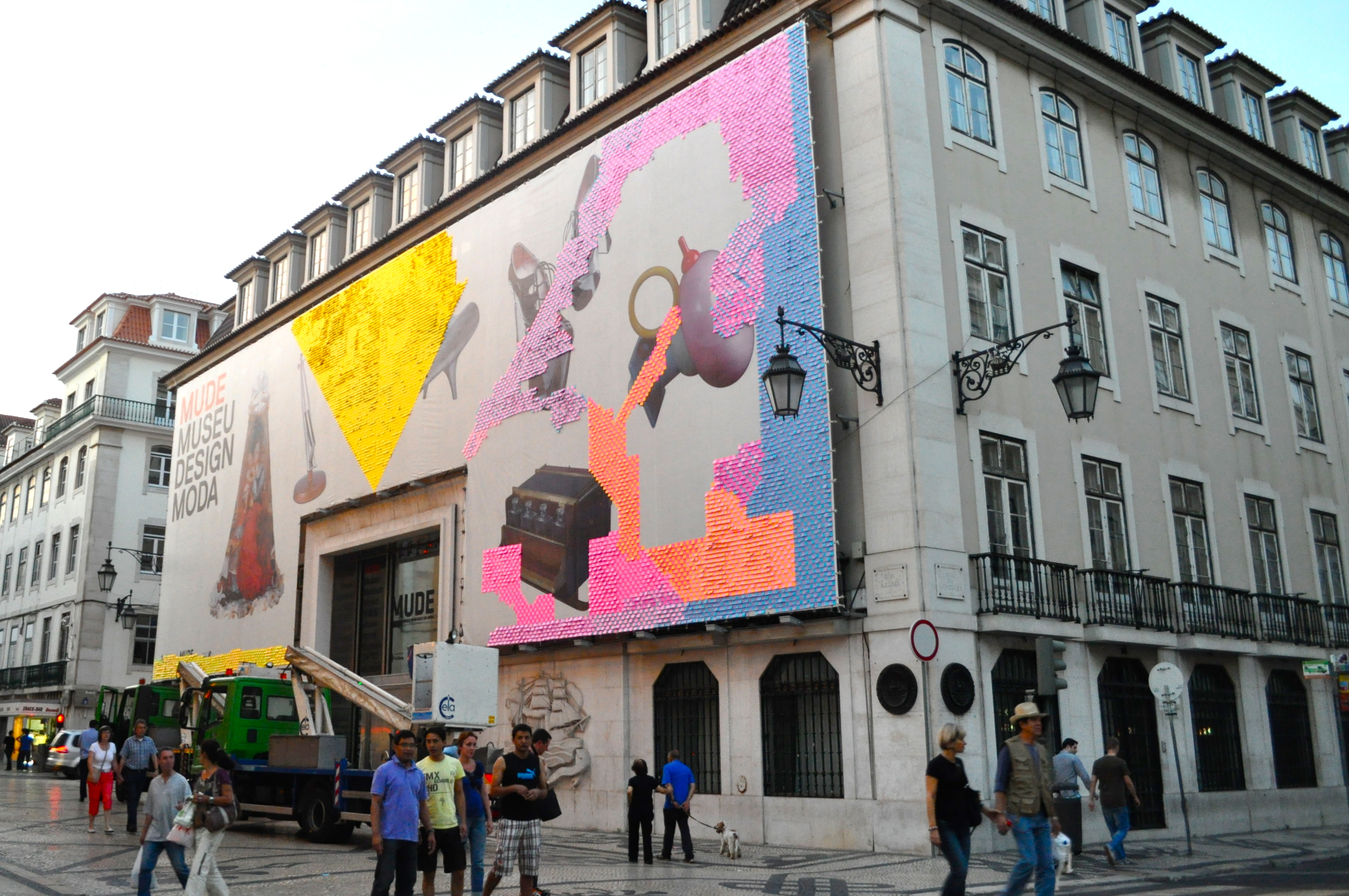 Fachada do Museu do Design e da Moda LISBOA (Lisbon) - Portugal